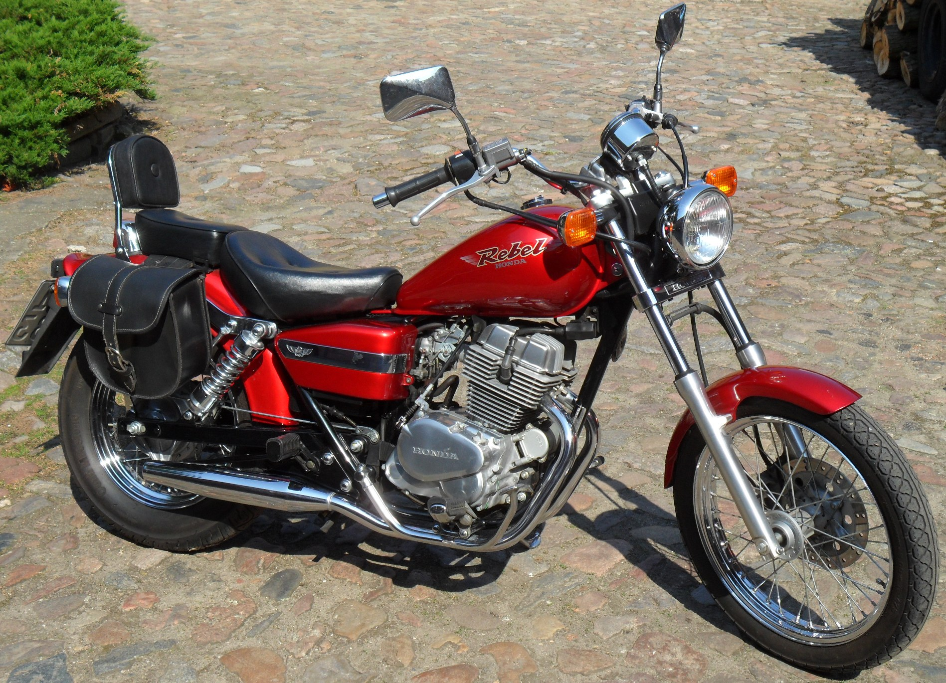 Honda Rebel MC32 Baujahr 1997